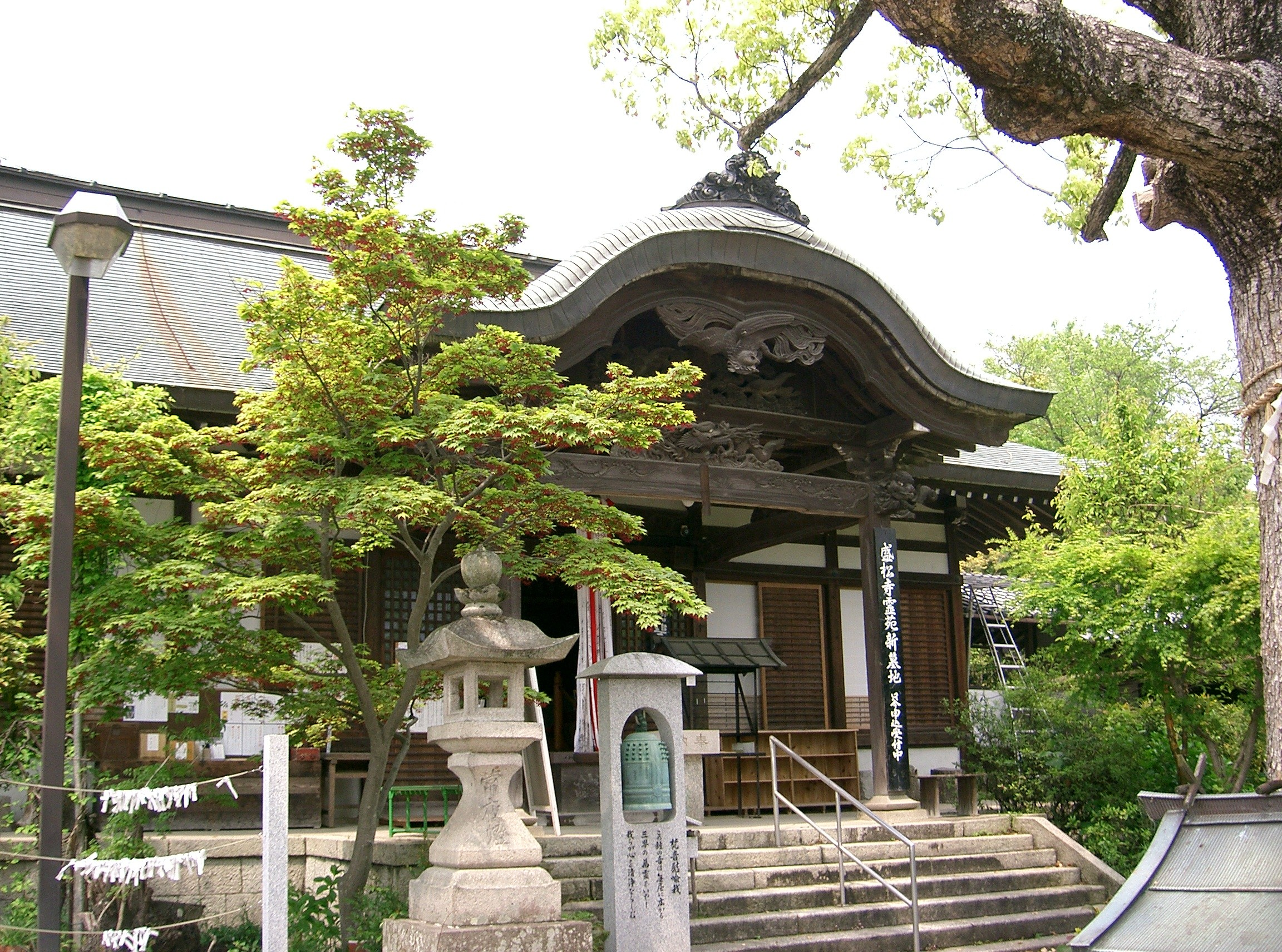 大阪府河内長野市にある高野山真言宗・準別格本山・盛松寺（せいしょうじ）